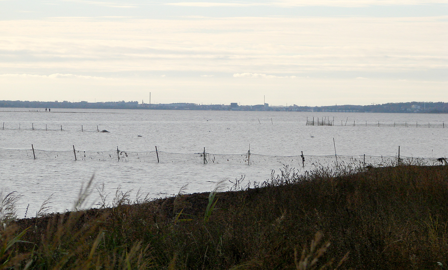 Horsens Fjord set fra Alrø mod vest; Horsens ses i baggrunden.